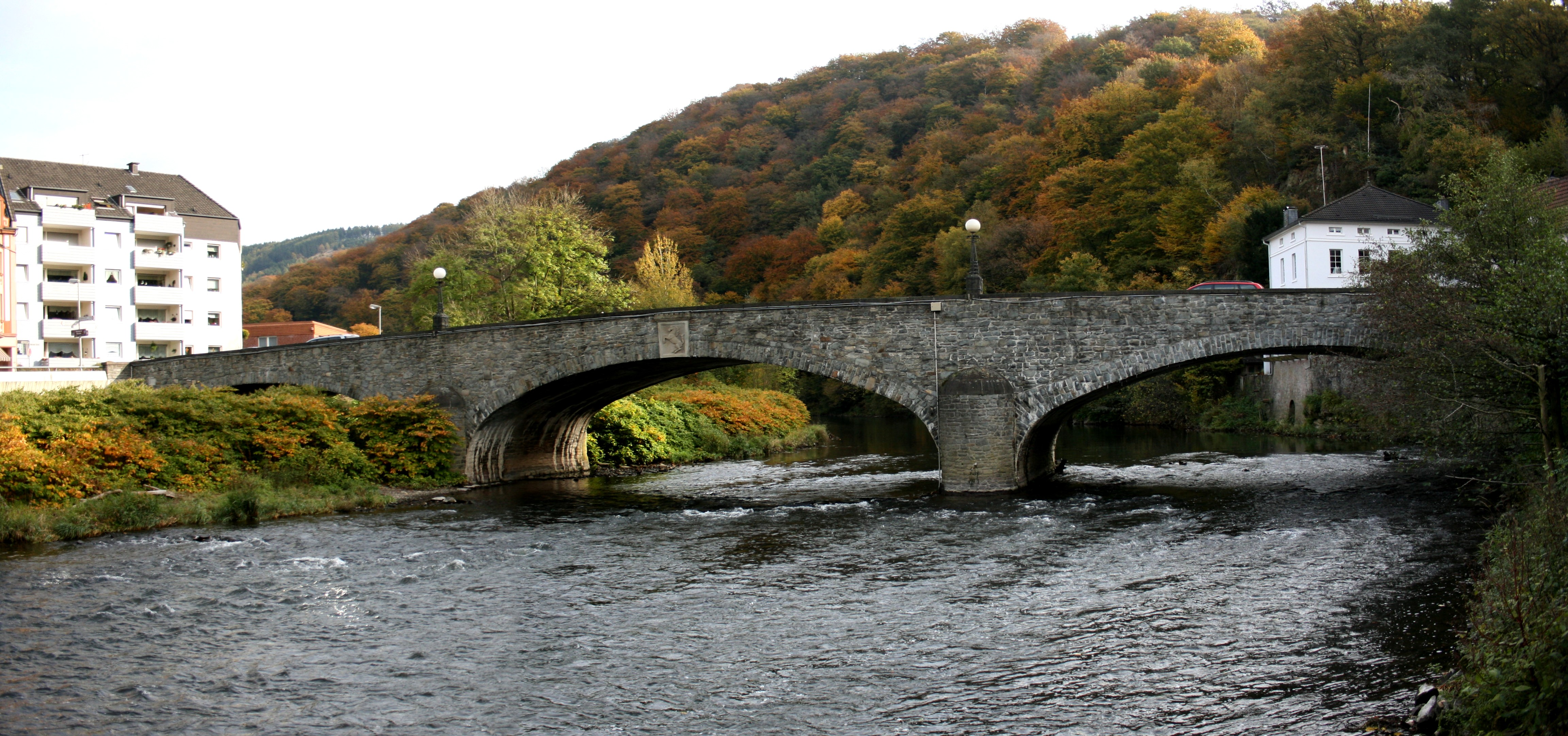 Steinerne Brücke in Altena